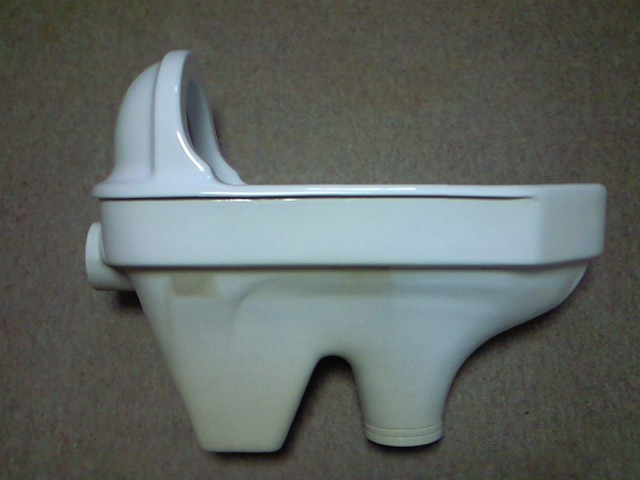 C75A側面